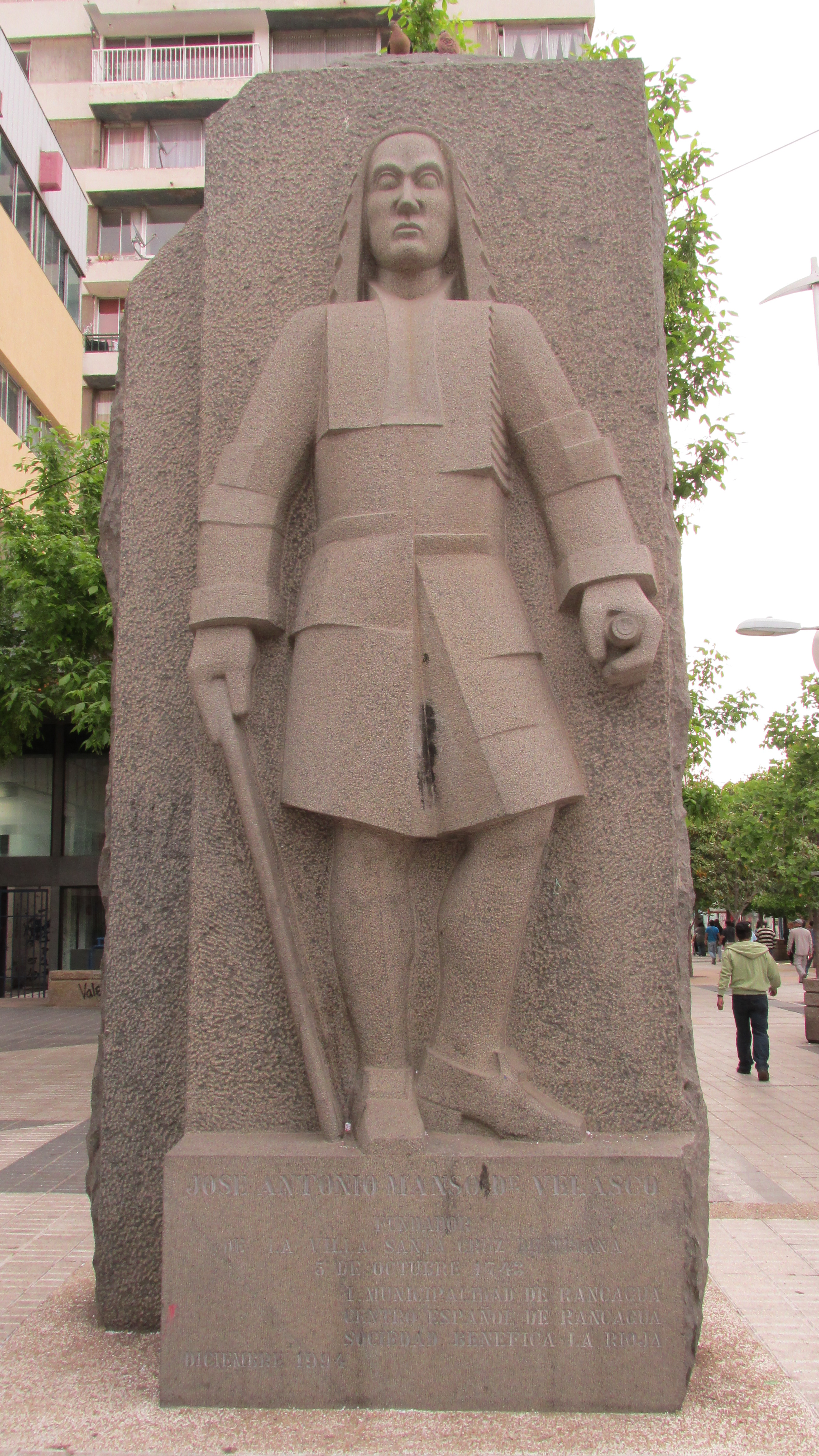 Estatua Manso de Velasco situada en Plaza de Los Héroes, Rancagua, Chile.